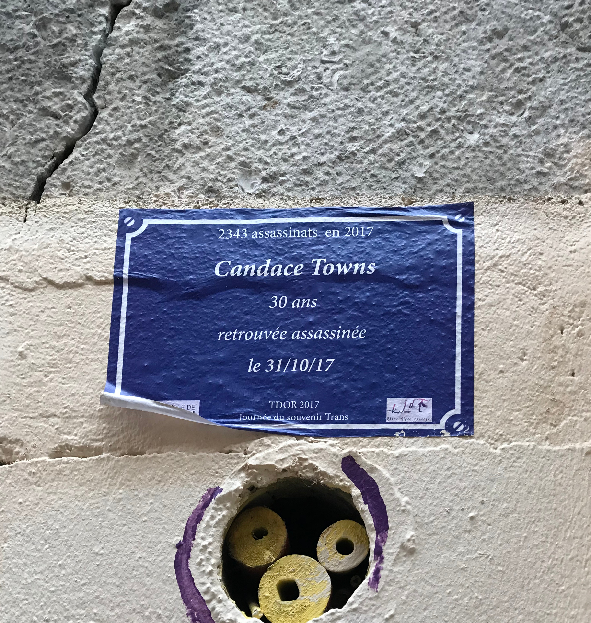 Fausse plaque de rue - Montée de la Grande Côte (Lyon) - souvenir trans - Candace Towns.